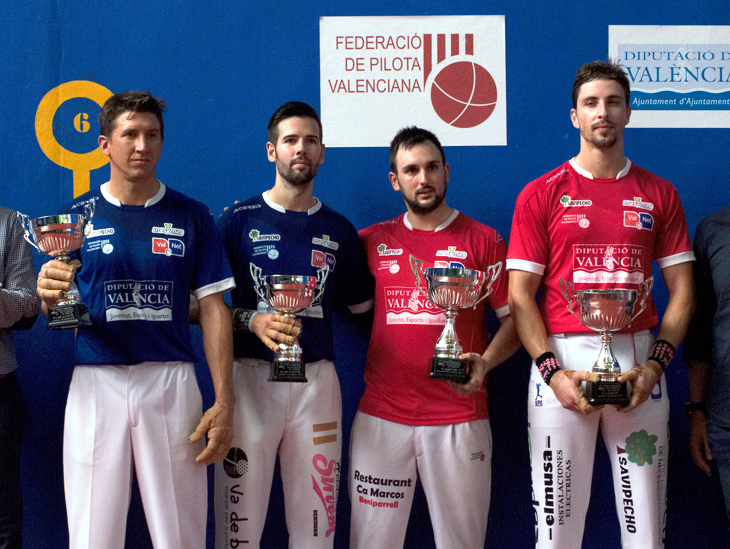 Els finalistes del XII Trofeu Diputació de Frontó en Almussafes.